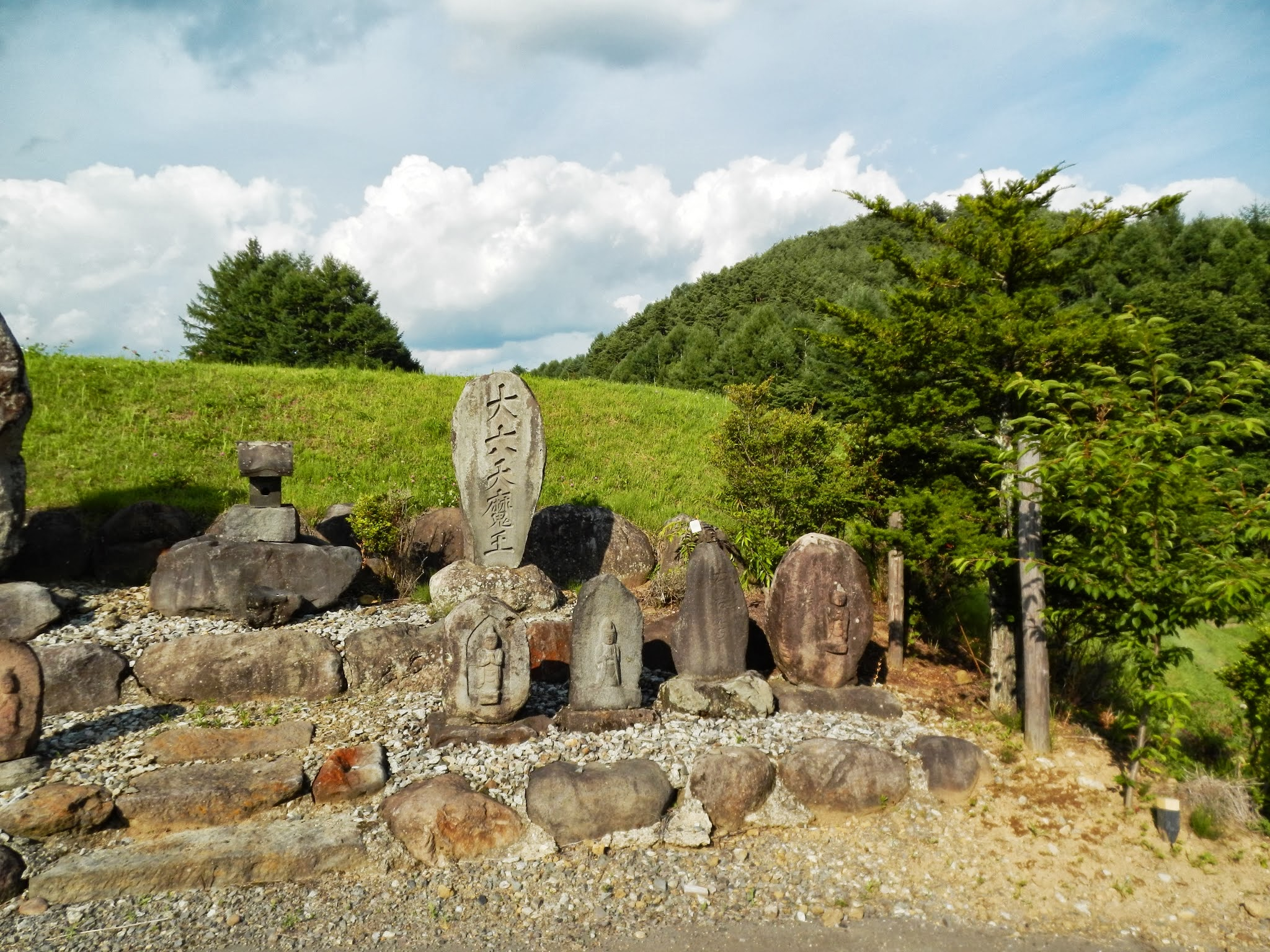 Izumino, Chino, Nagano Prefecture 391-0214, Japan